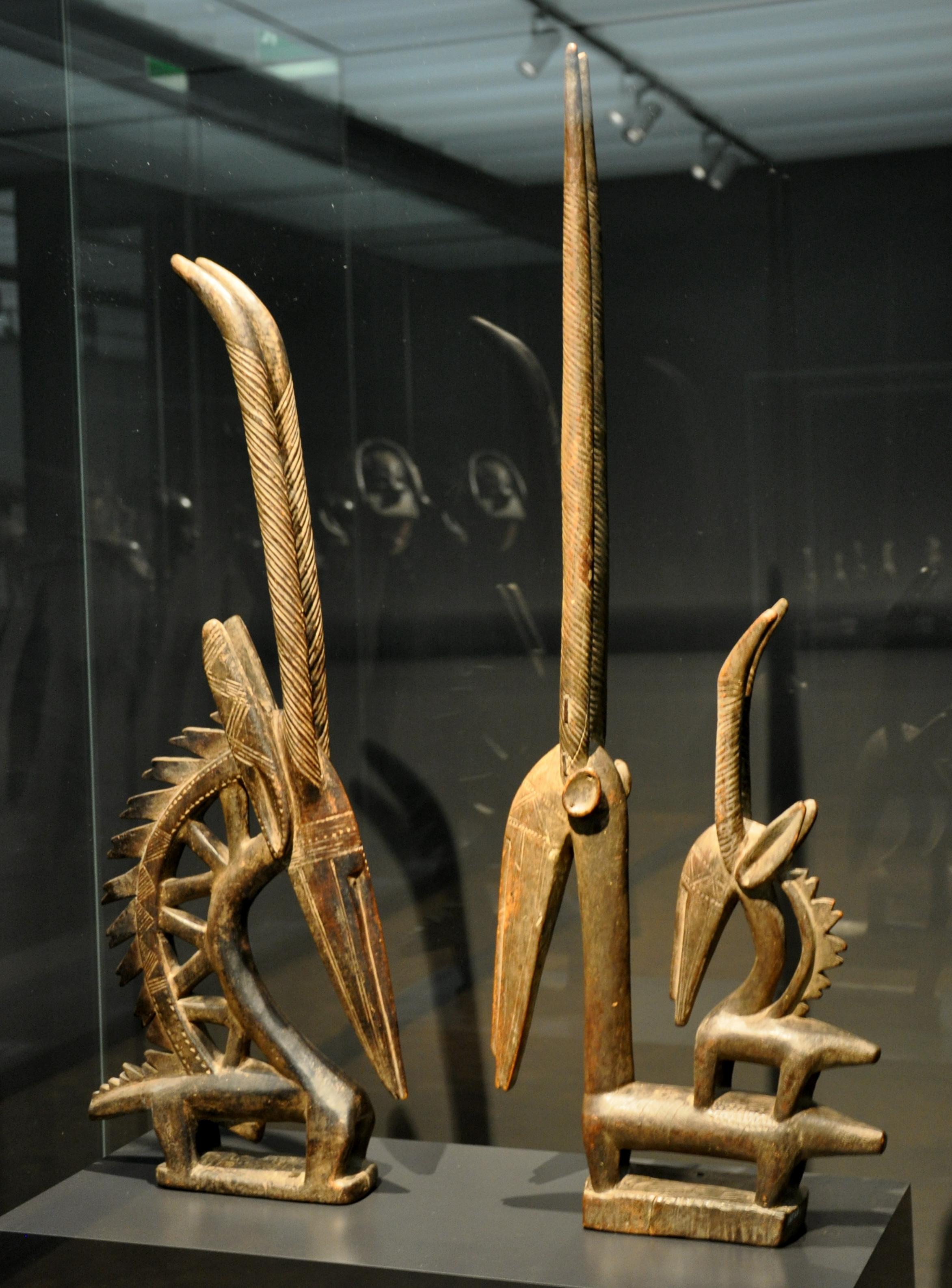 Maskenpaar ci wara, Bamana-Meister der fliegenden Mähne, Mali, Segu-Region, frühes 20. Jahrhundert Museum Rietberg, Zürich; Inv. Nr. RAF 202 und RAF 203